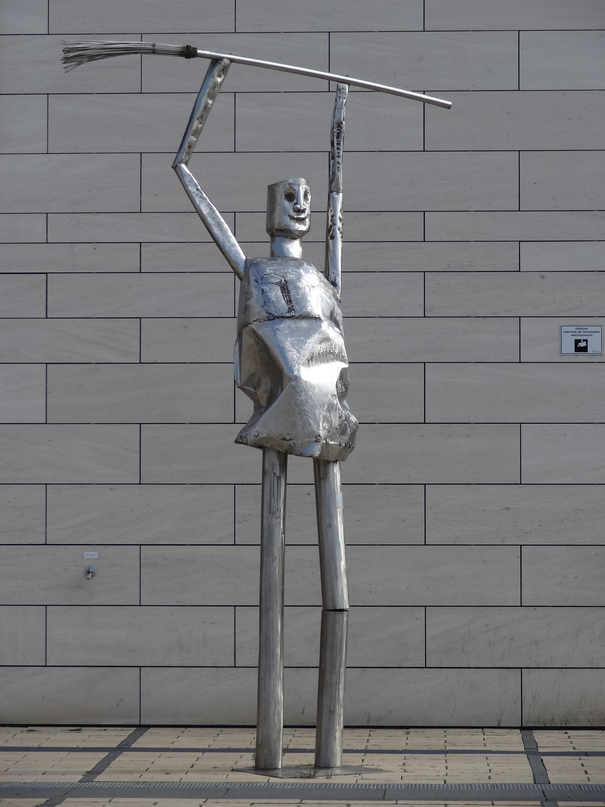 Hohlplastik "Paris" aus Edelstahlblech von Ulrich Barnickel, 2009. Rathaus Gießen